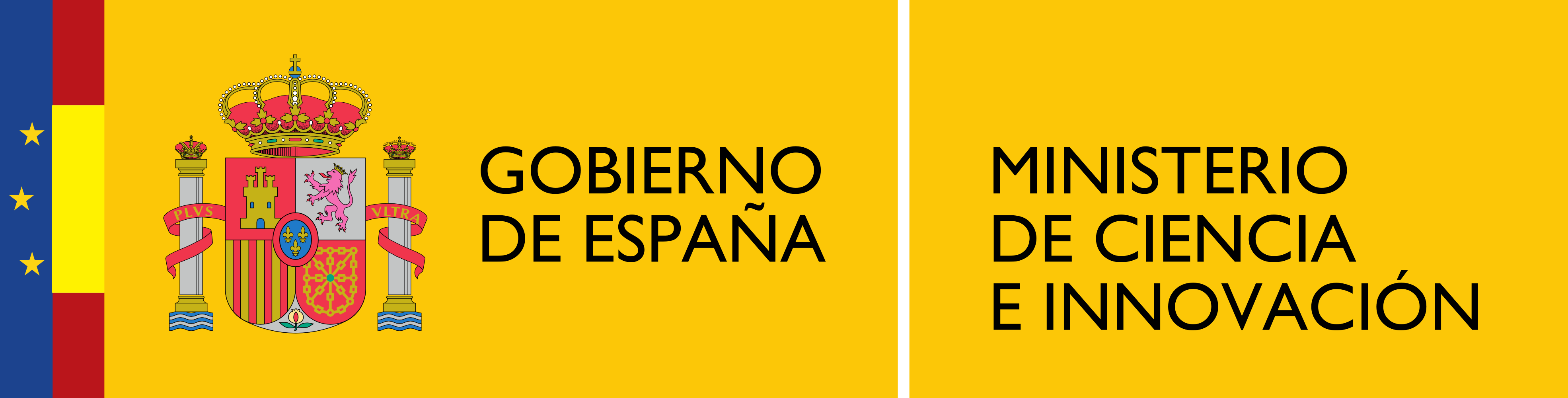 Logotipo del Ministerio de Ciencia e Innovación